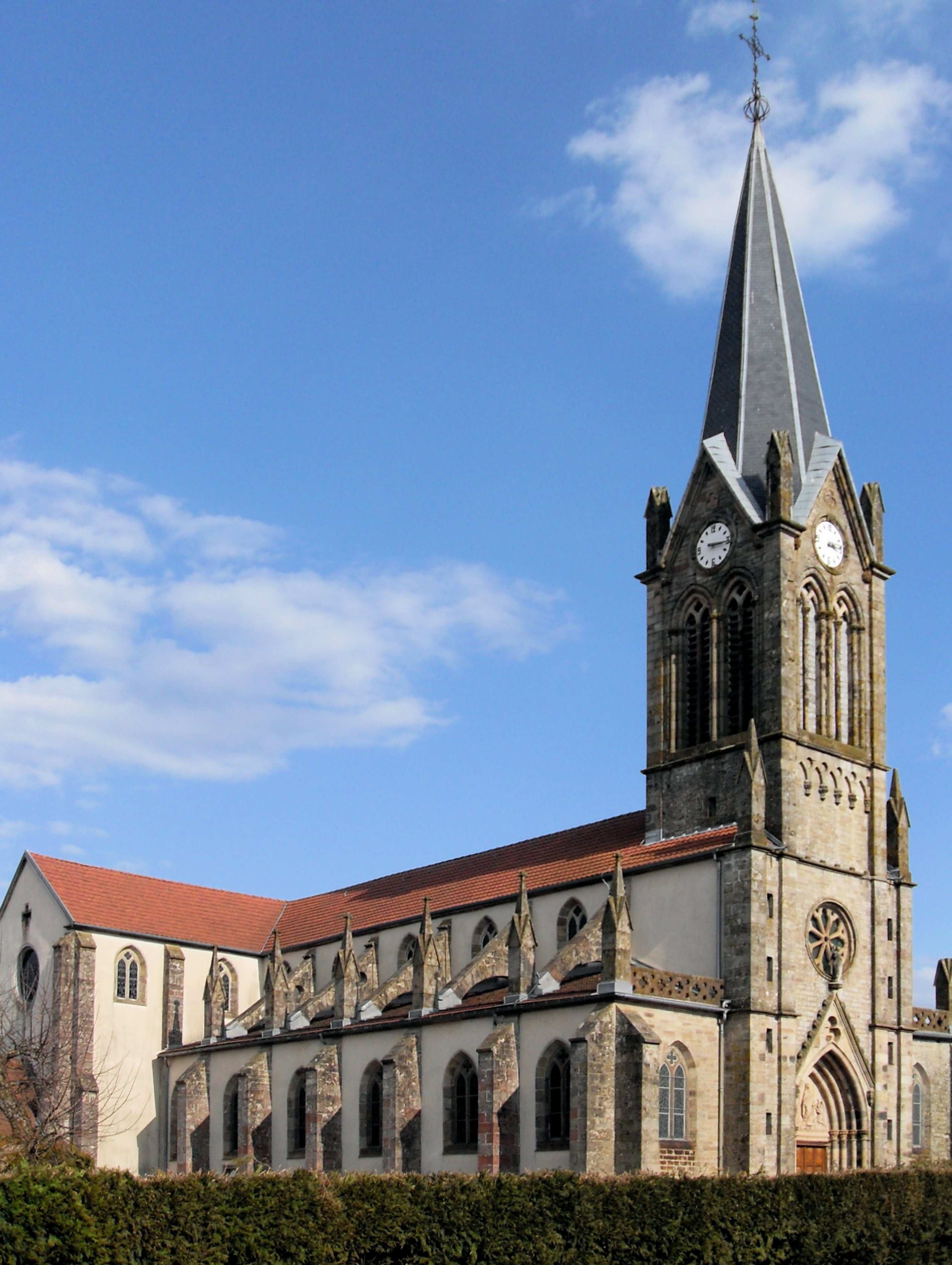 L'église Saint-Valbert à Frahier-et-Chatebier